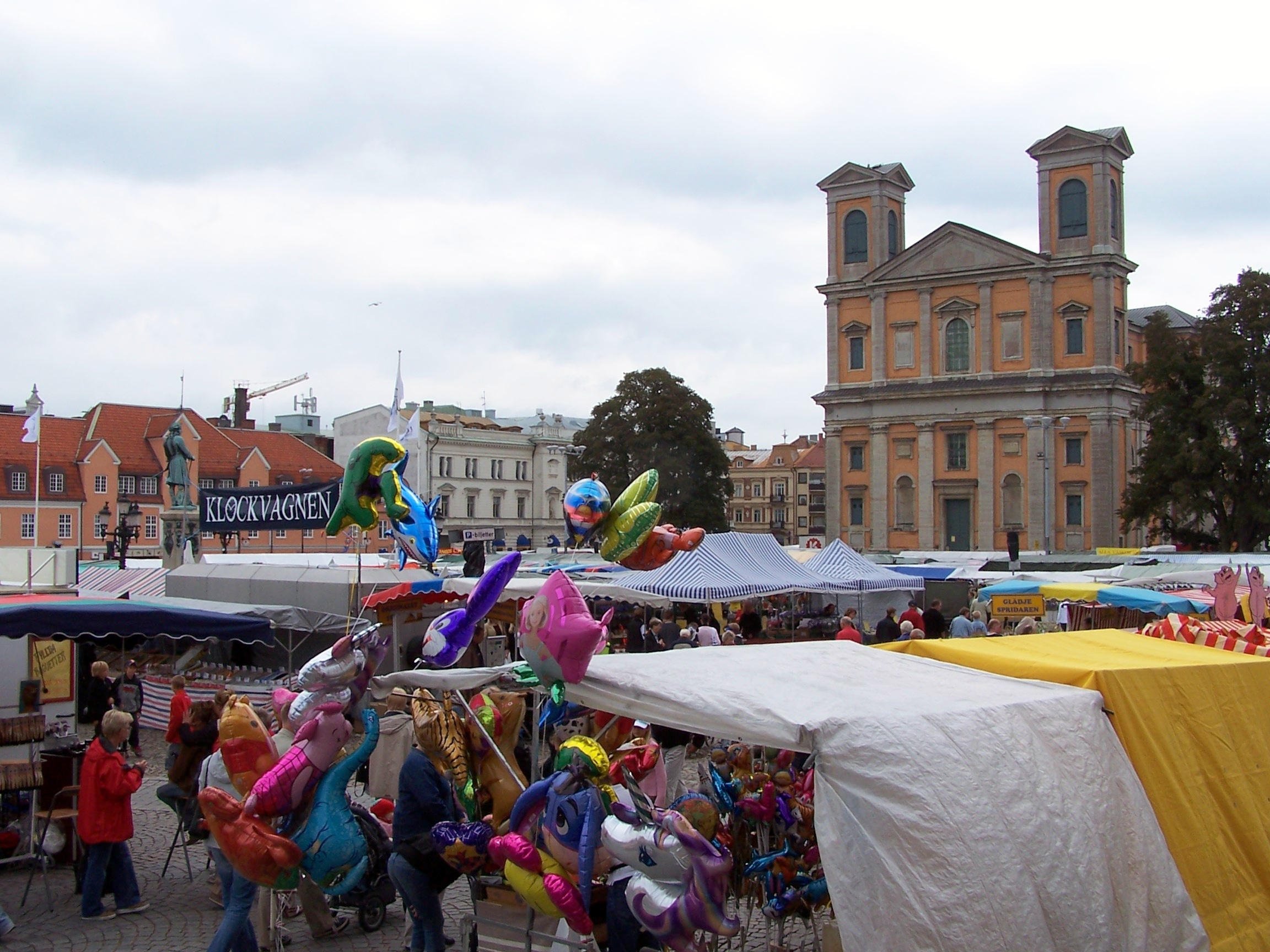 Lövmarknaden i Karlskrona 2004